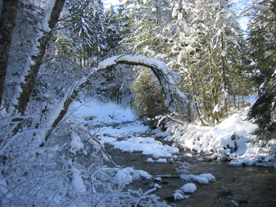 Lanersbach au bas du domaine skiable d'Eggalm Photographiée par moi-même Laura06